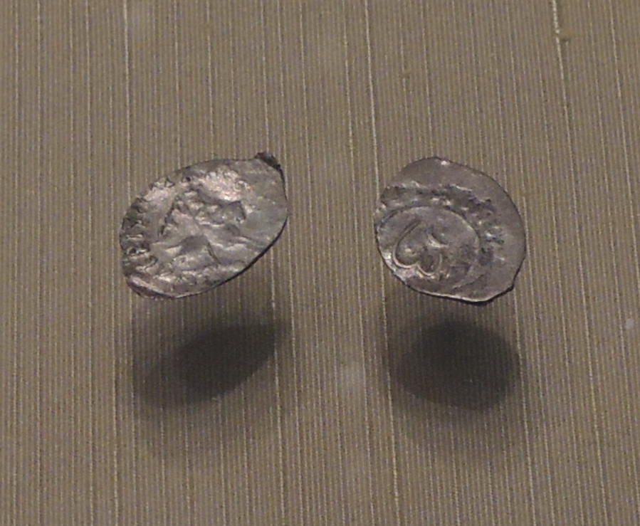 Денга новгородская. Новгород, конец 1480-х. Серебро. ММК. Монеты с русско-татарскими надписями Выставка "Великий князь и государь всея Руси Иван III"